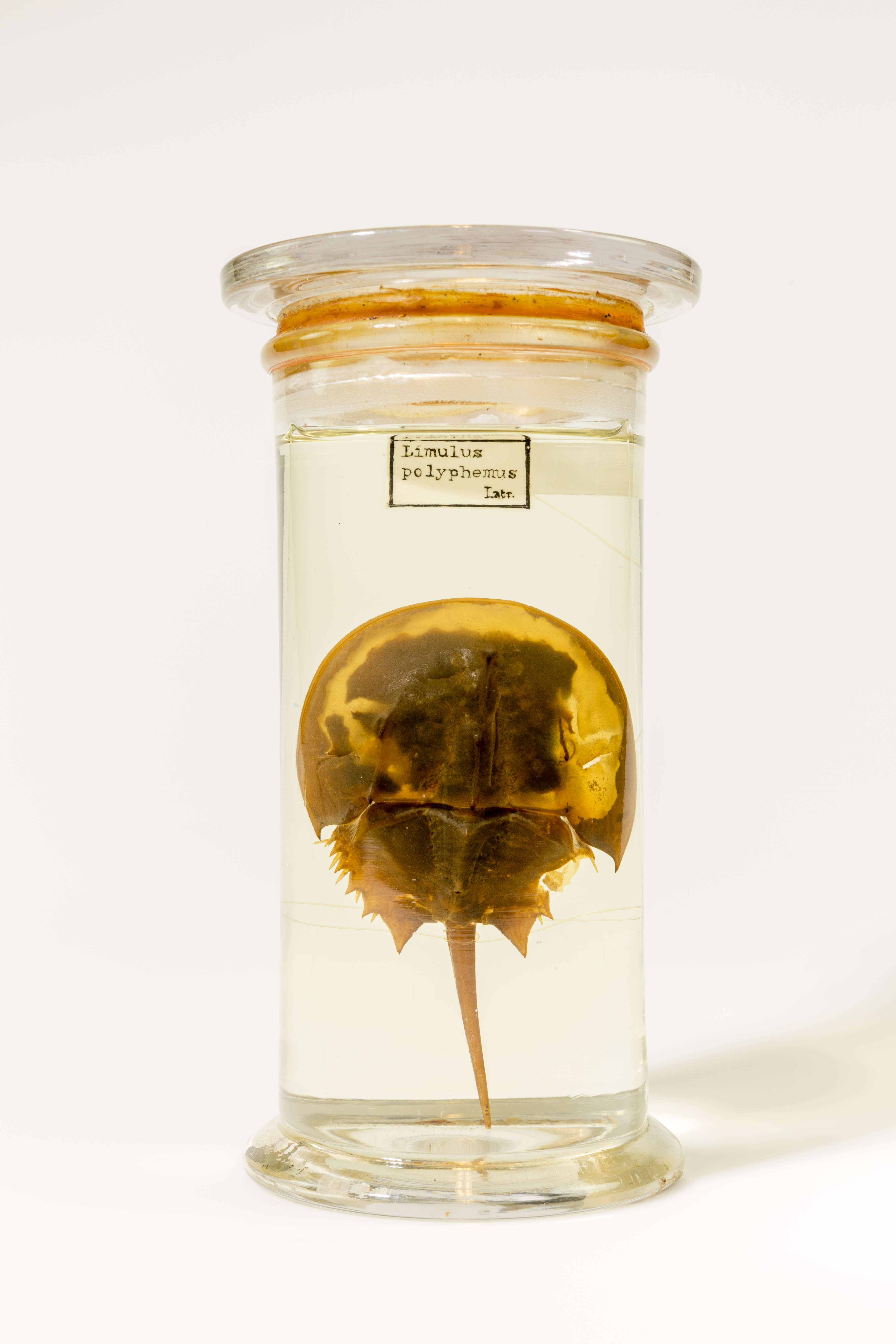 Limule, bain liquide, bocal.